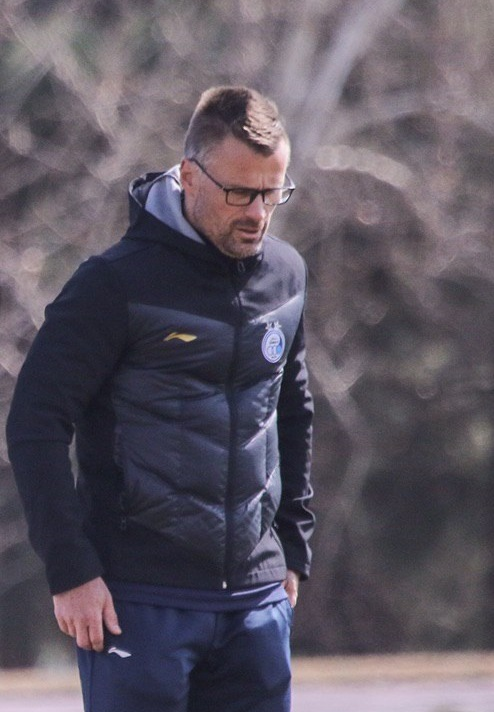 مارتین فورکل در تمرین استقلال